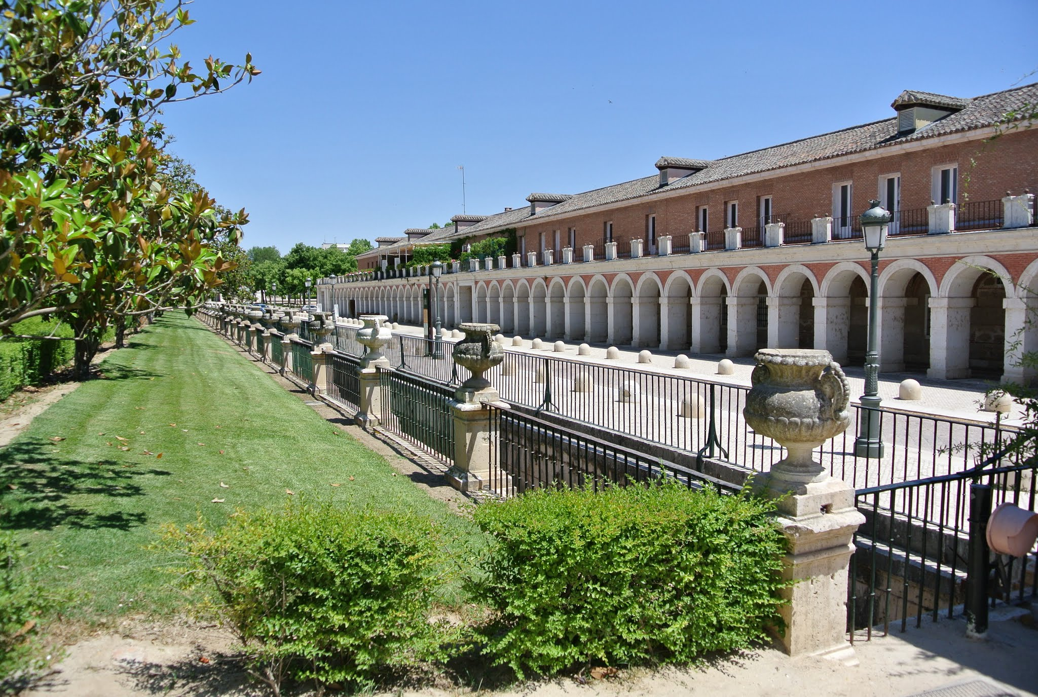 28300 Aranjuez, Madrid, Spain